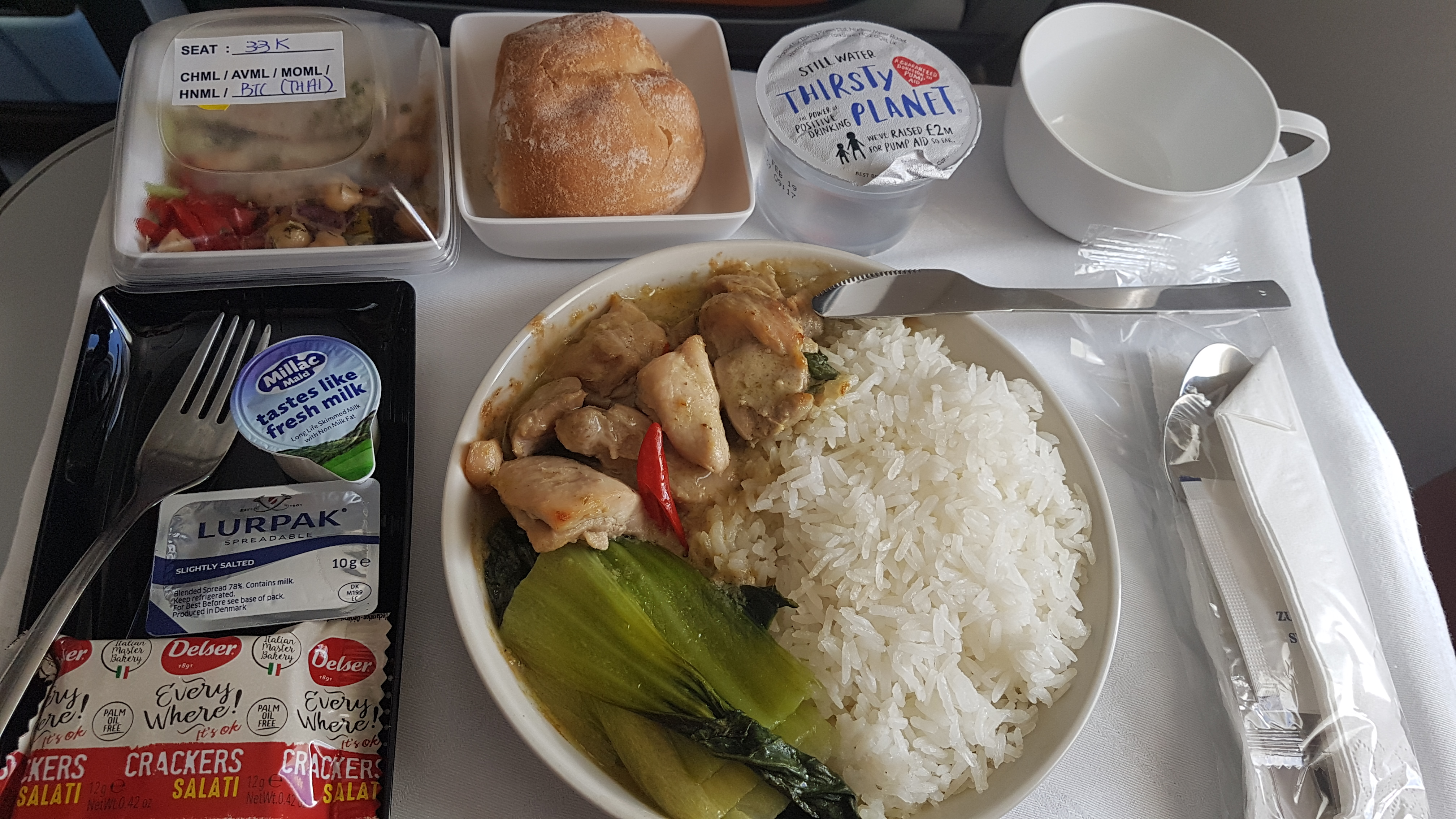 Singapore Airlines Economy Class in-flight Meal on Airbus A380